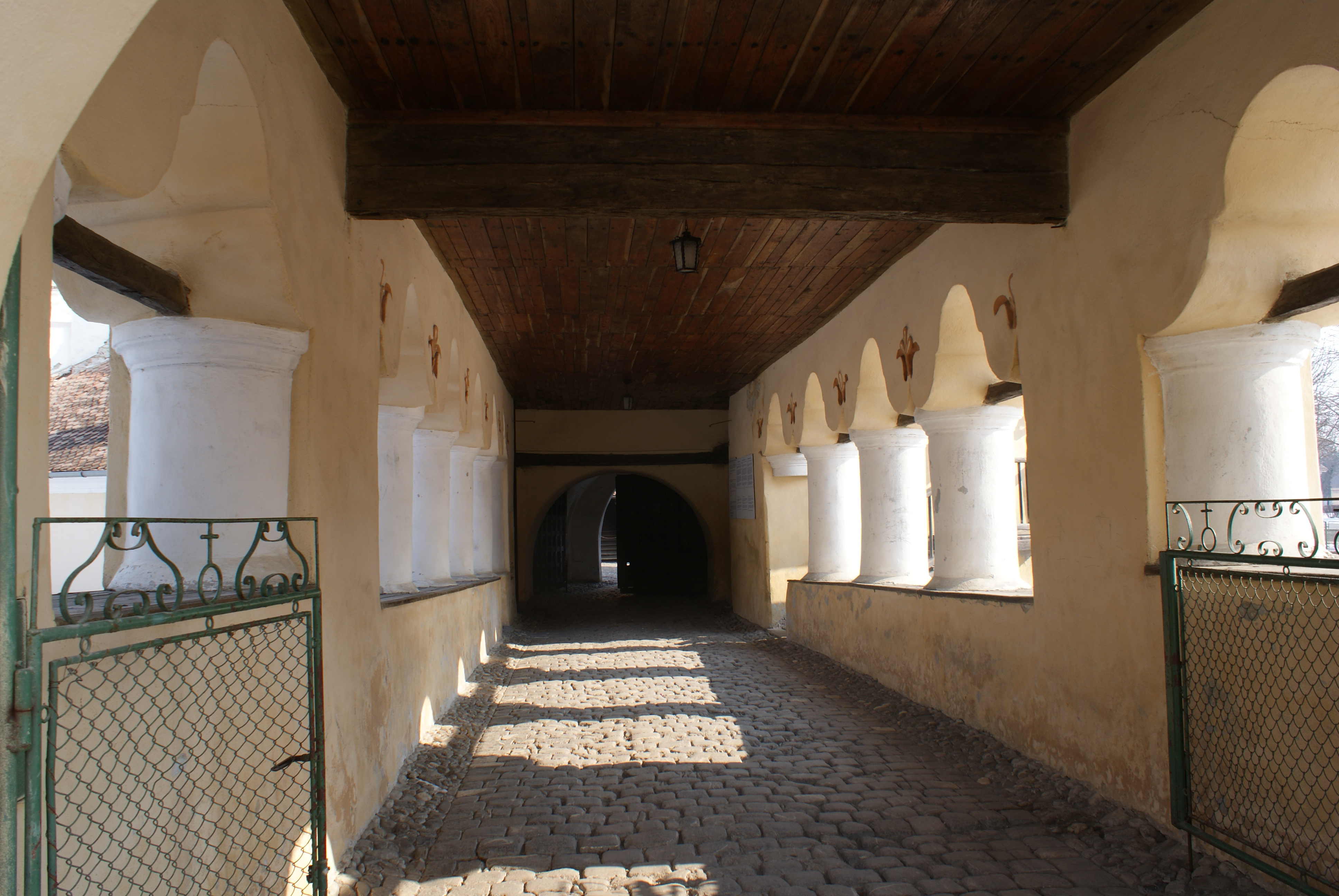 Galeriecuarcade 06